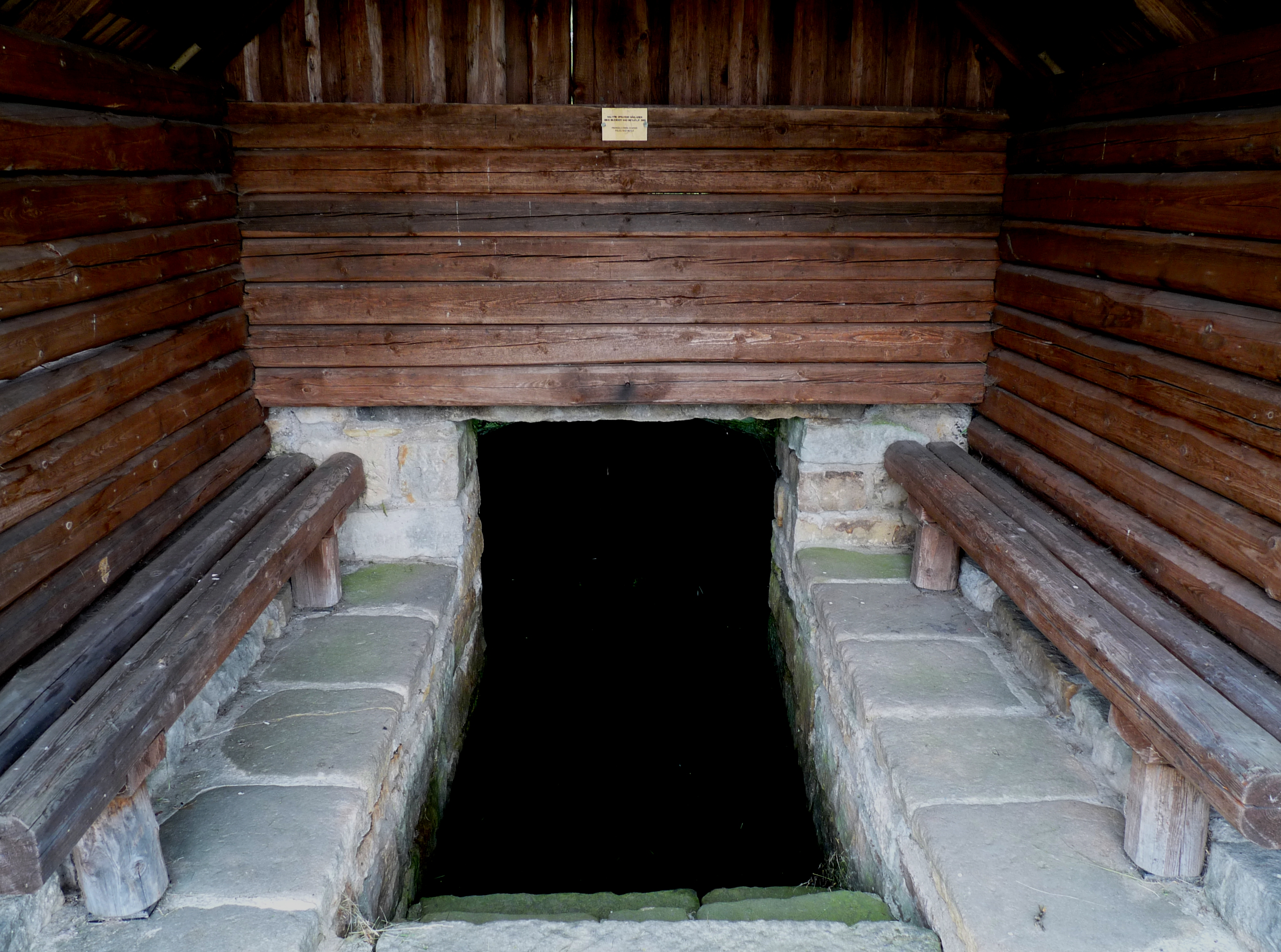 Dnes jsou bezděkovské haltýře především místem odpočinku pro turisty.